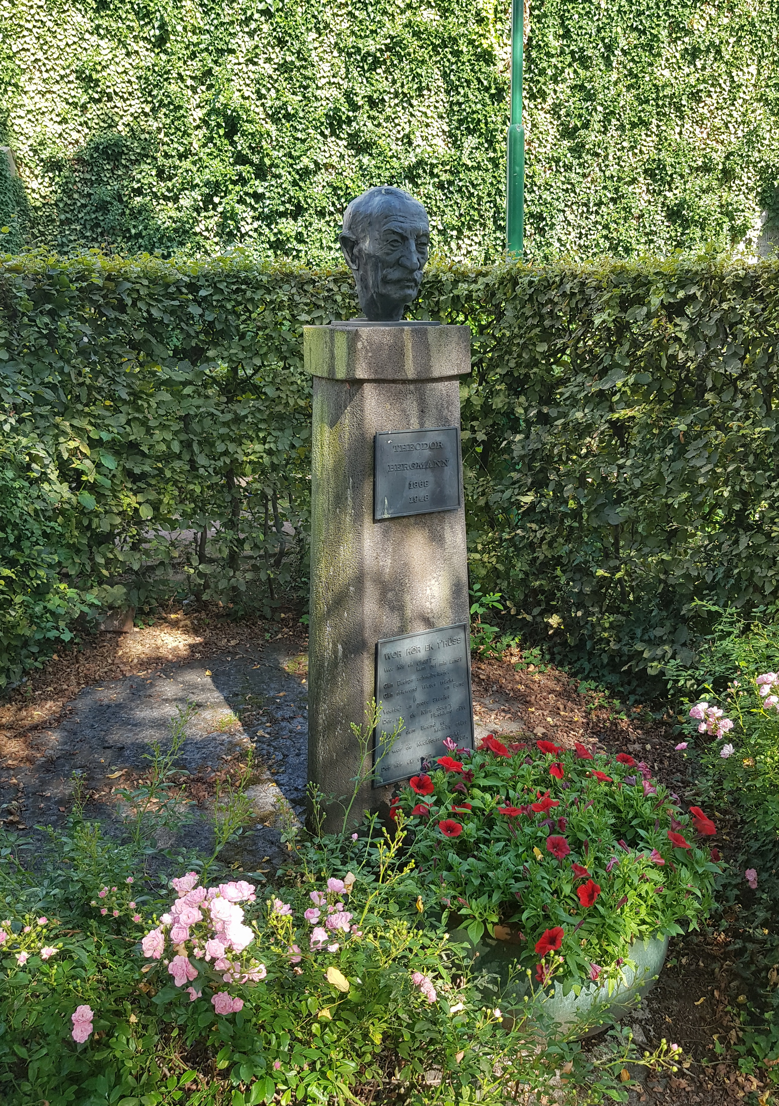 Denkmal für Theodor Bergmann (1868-1948) in Kevelaer, Basilikastraße.